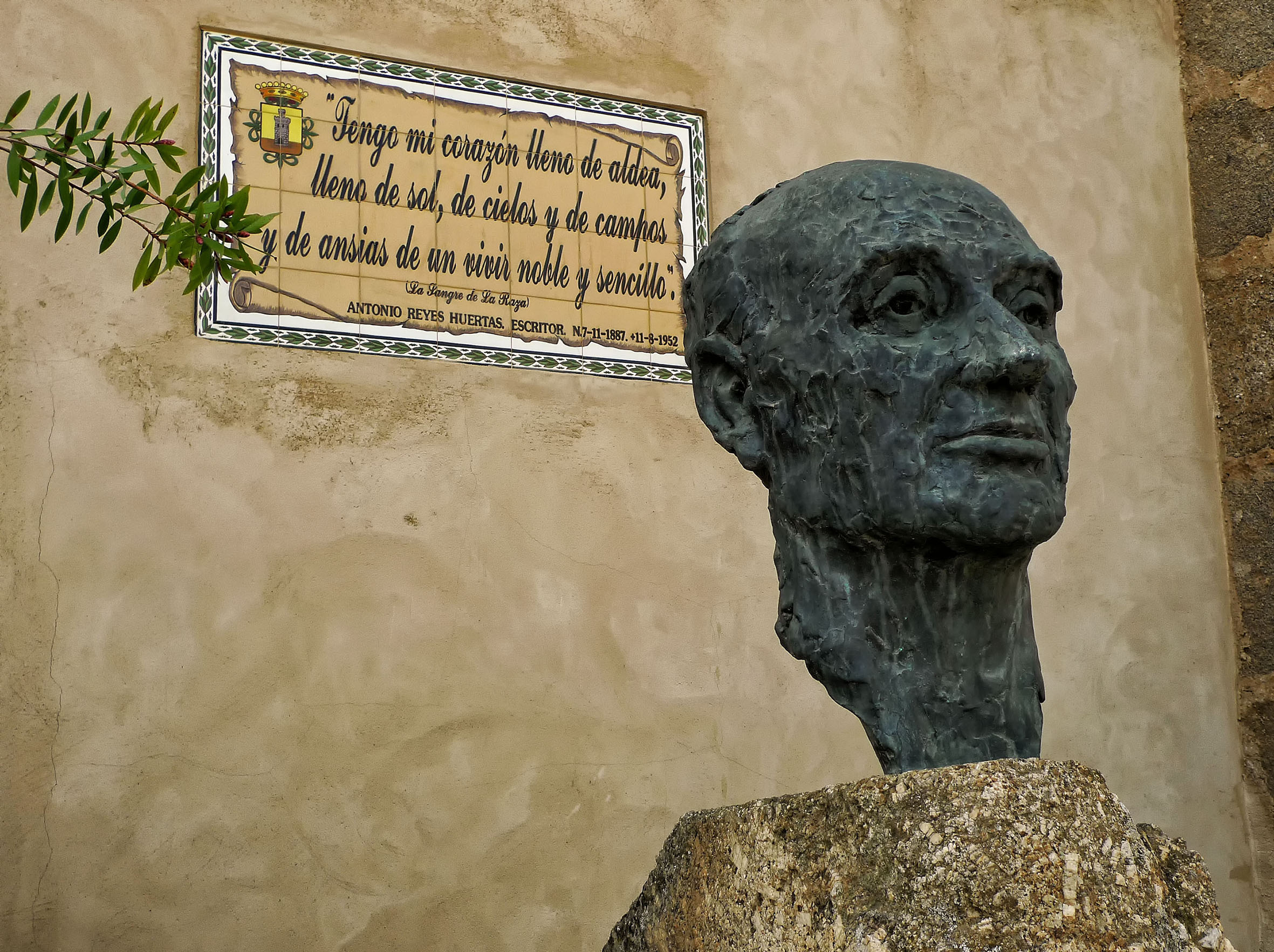 Busto del escritor Antonio Reyes Huertas en Campanario (Badajoz) - Extremadura (España)